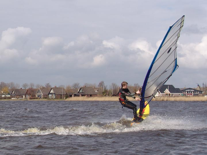 Categorie:Afbeelding watersport